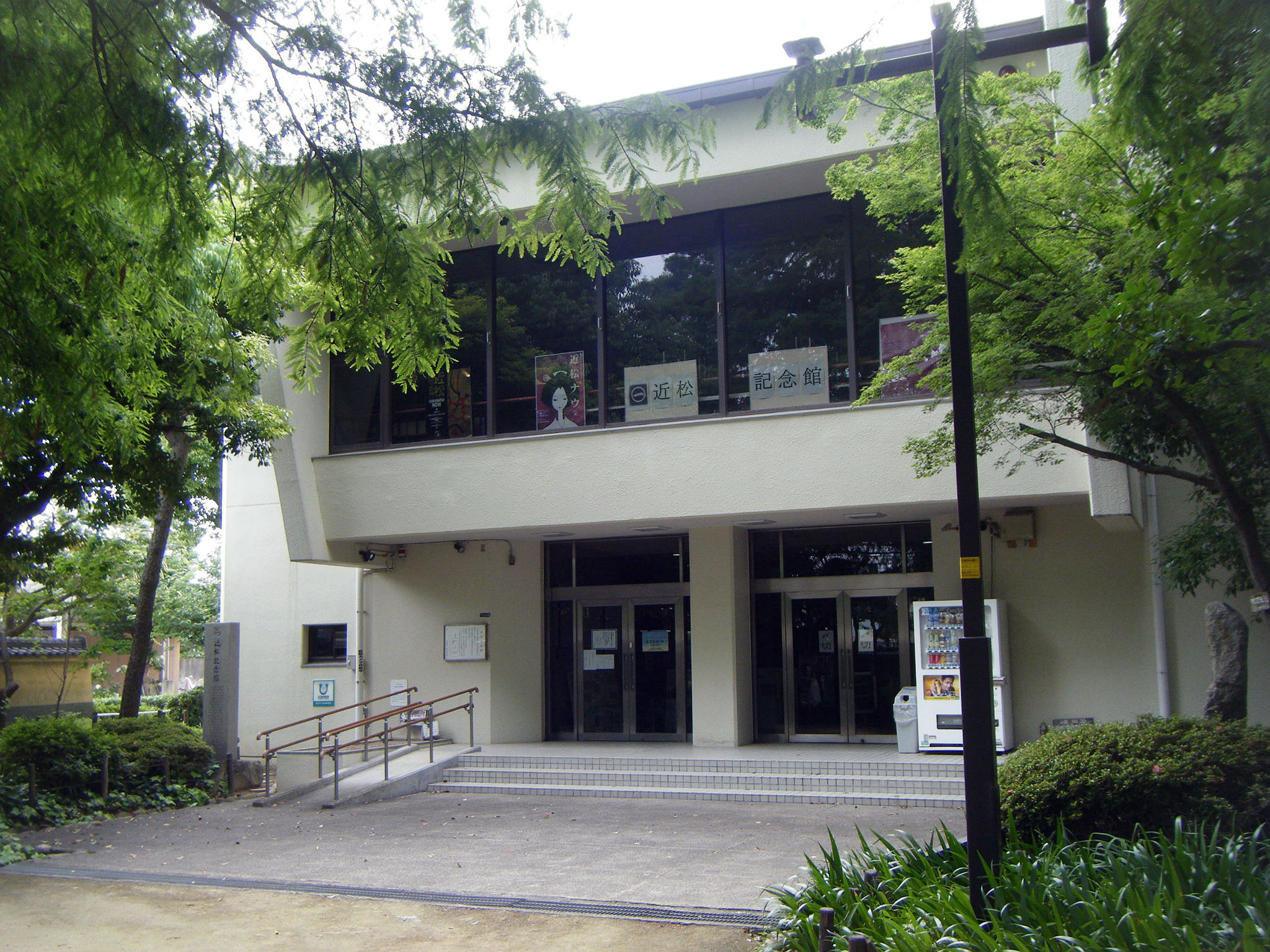 近松記念館 兵庫県尼崎市